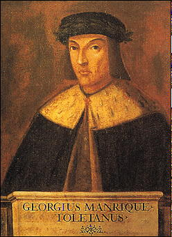 Retrato de Jorge Manrique (c.1440-1479)